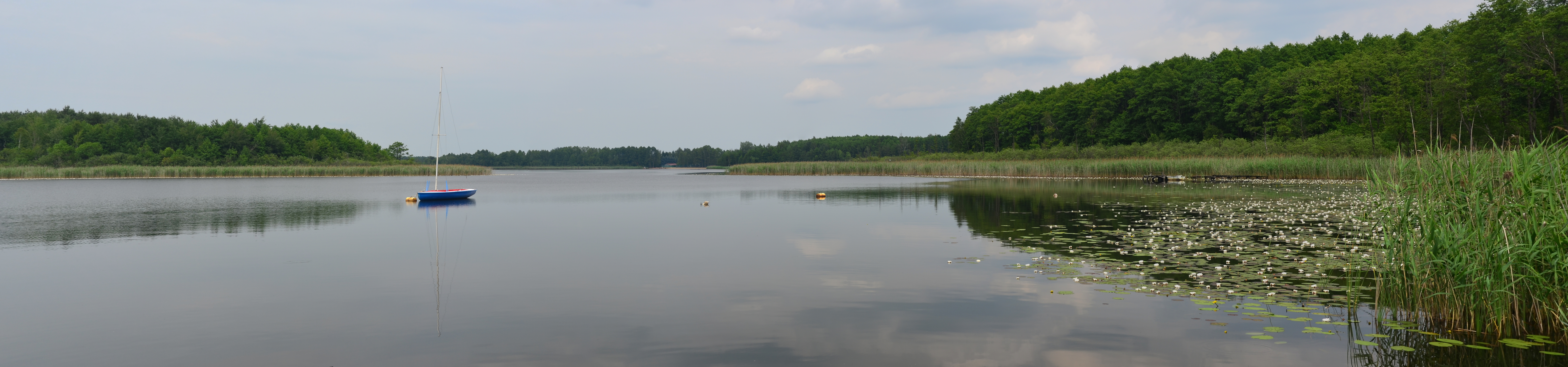 Panorama jeziora Łukcze, leżącego we wsi Rogóźno, gm. Ludwin, woj. lubelskie.